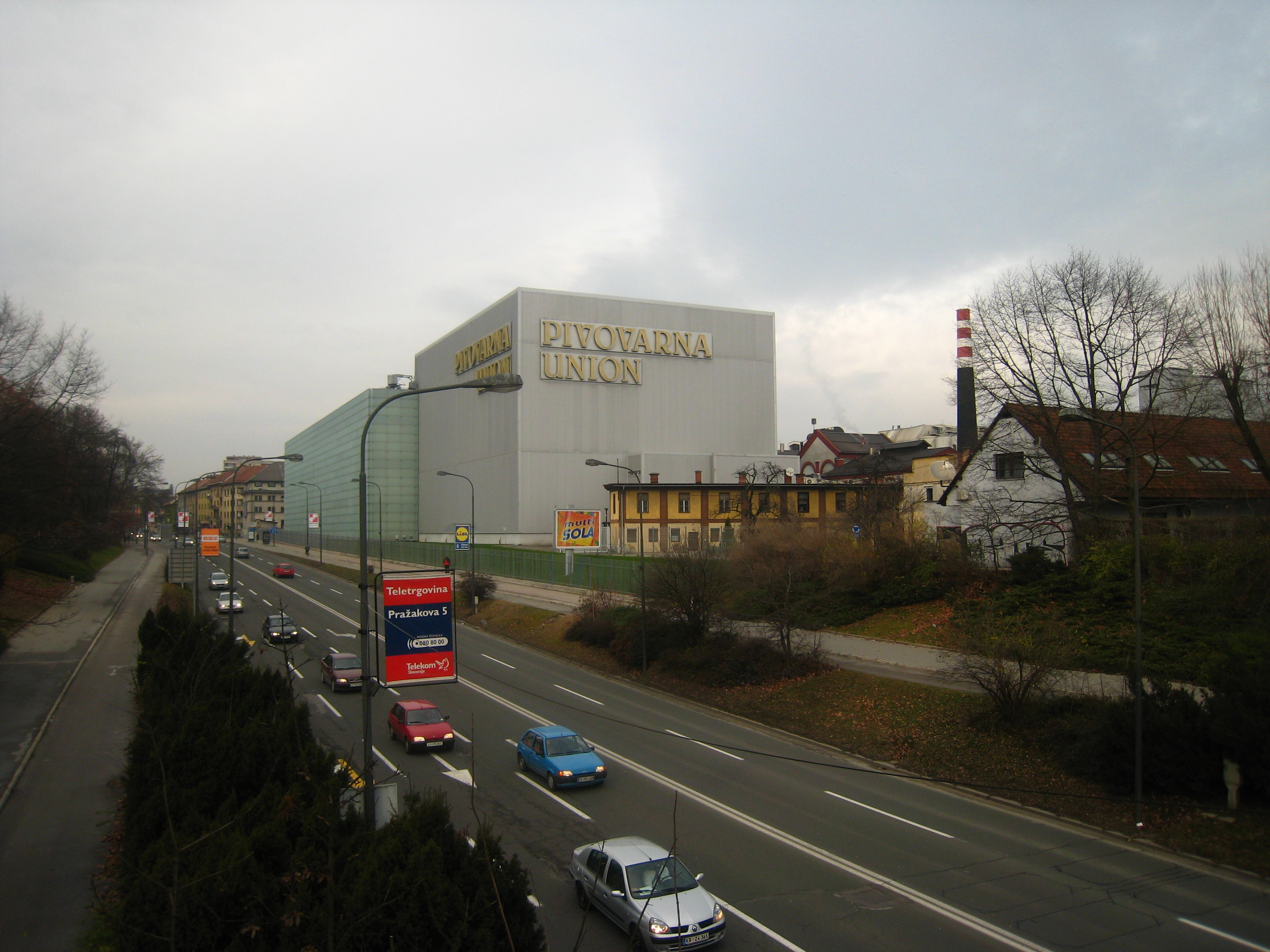 Celovška cesta